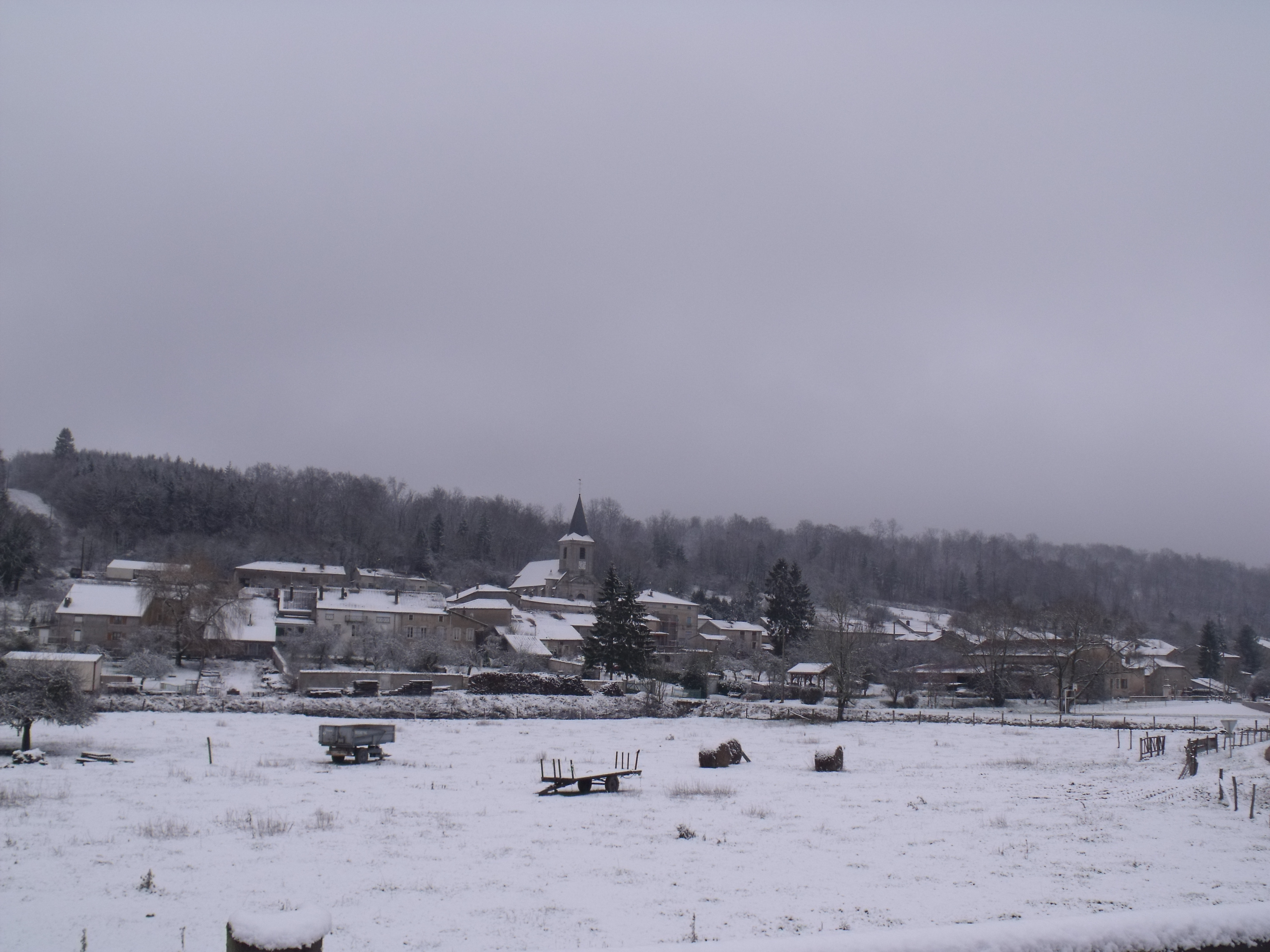 vue générale de la commune durant l'hiver 2011